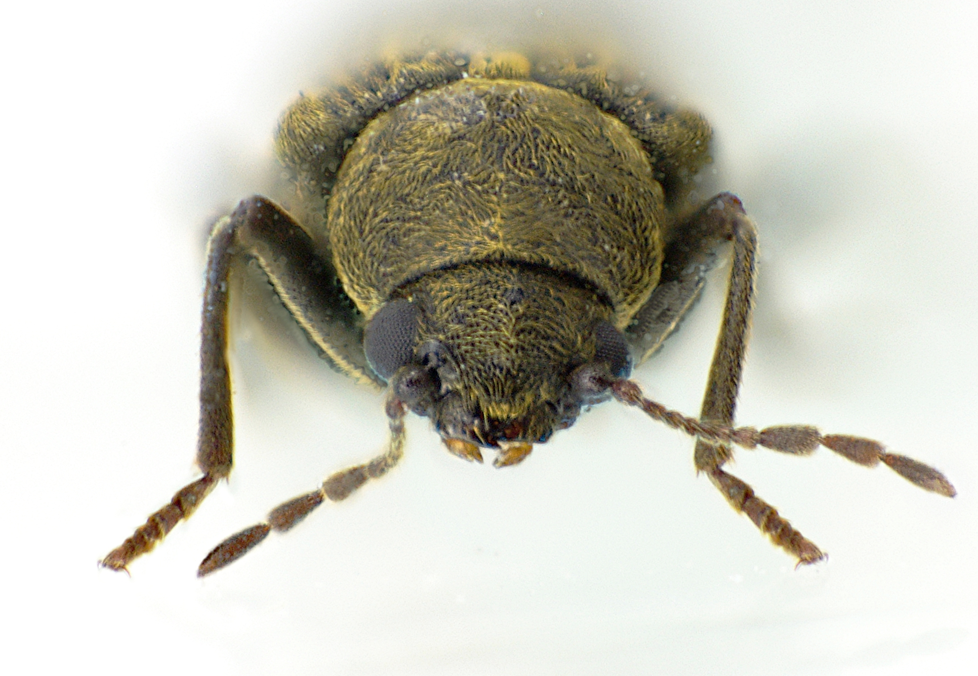 Grynobius planus aus Baden-Württemberg zwischen Rottweil und Tuttlingen, 700 m hoch, am 5. Mai 2914